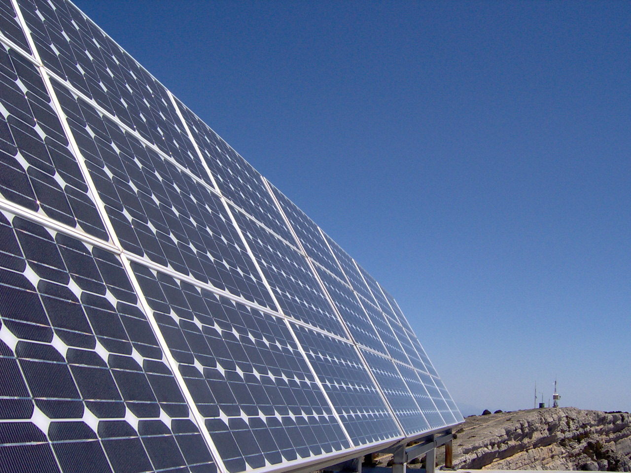 Solar Panels - SpainPaneles solares y repetidor al fondo